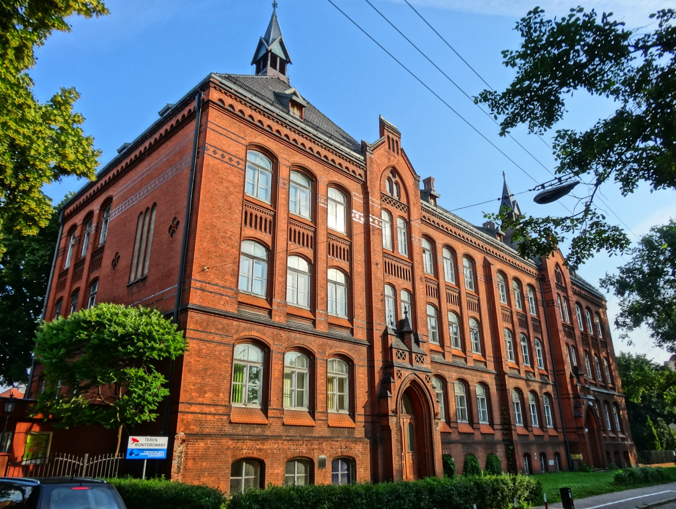 Budynek dawnej szkoły powszechnej (Hippelschule) zbud. 1900-1902, Bydgoszcz, zabytek, ul. Kordeckiego 20, w gestii Uniwersytetu Technologiczno-Przyrodniczego